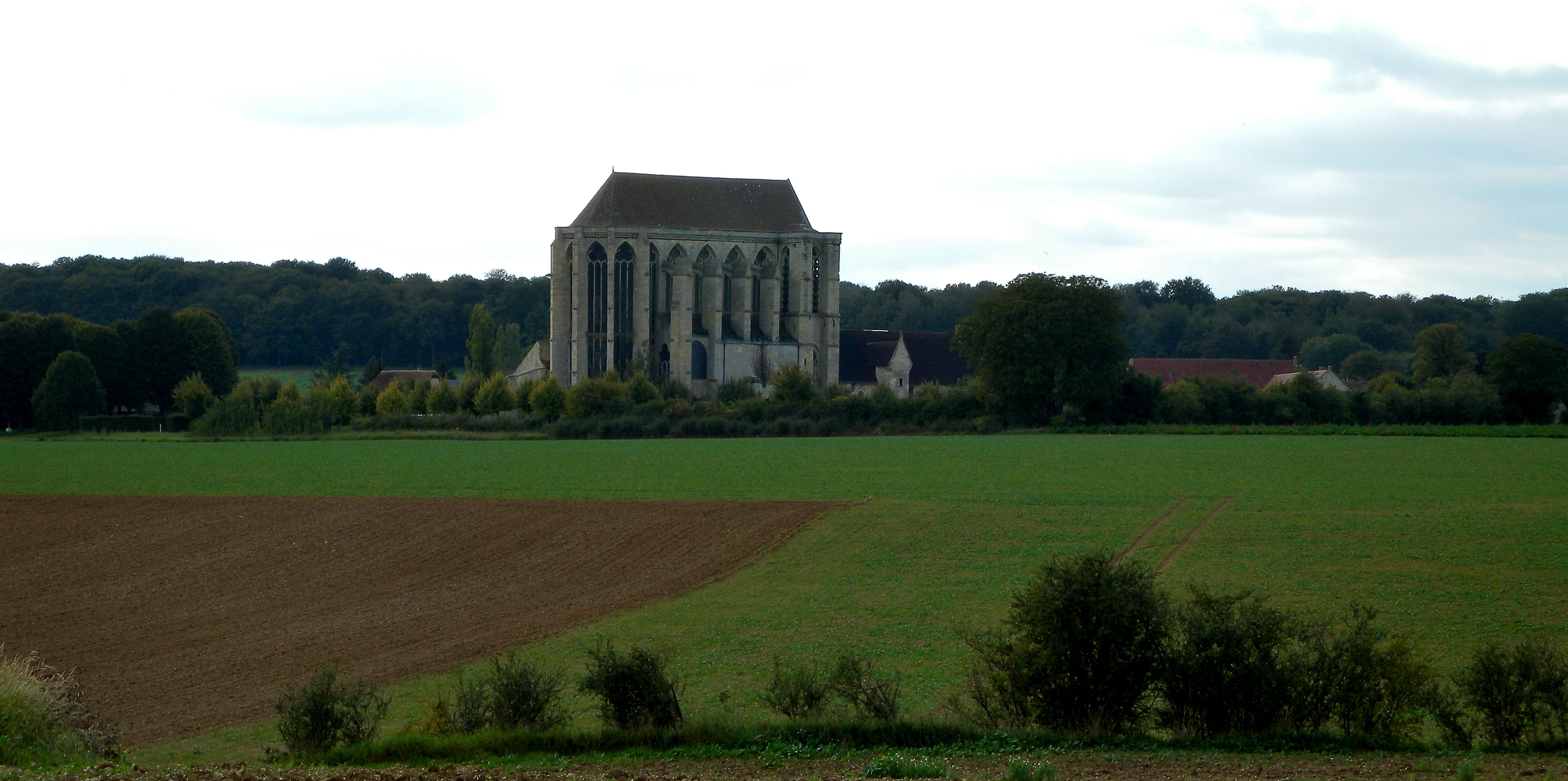 This building is en partie classé, en partie inscrit au titre des Monuments Historiques. .